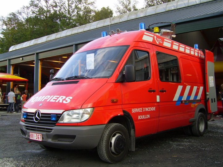 Véhicule de désincarceration sri Bouillon